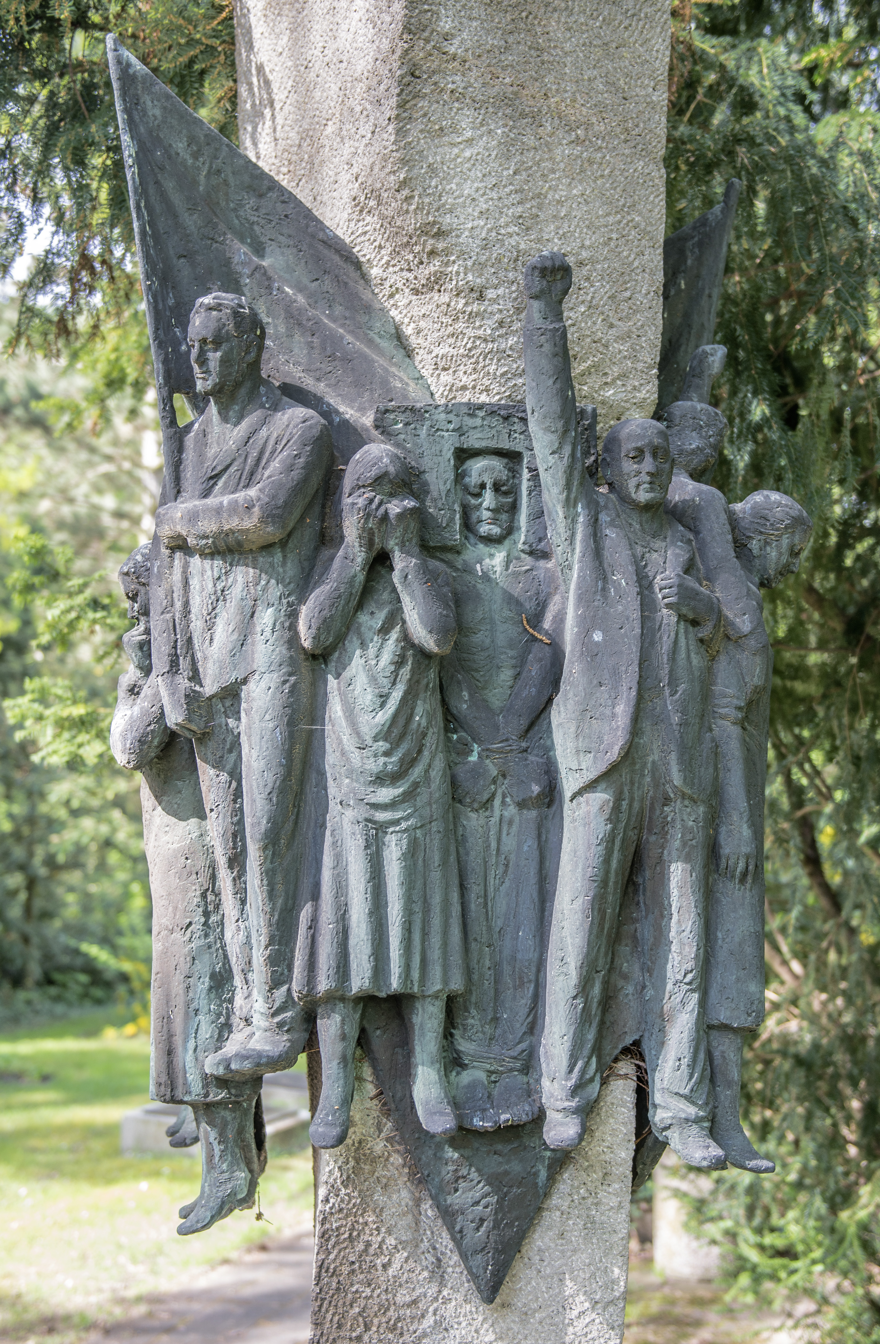 Mahnmal für die Kämpfer gegen den Krieg und für die Opfer des zweiten Weltkrieges. Das Mahnmal steht auf der Gräberabteilung der Opfer des zweiten Weltkrieges auf Friedhof Pankow III